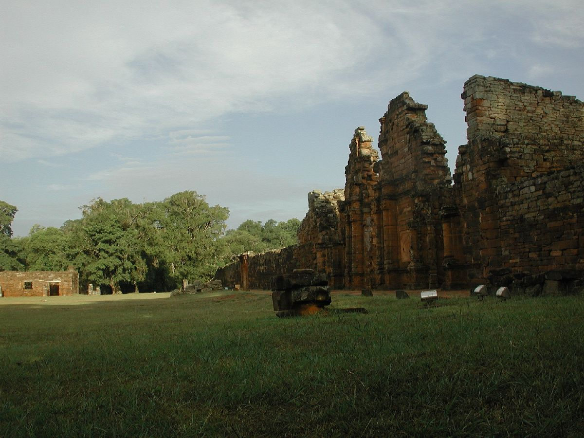 Jesuitenreduktion San Ignacio Mini, Misiones, Argentinien